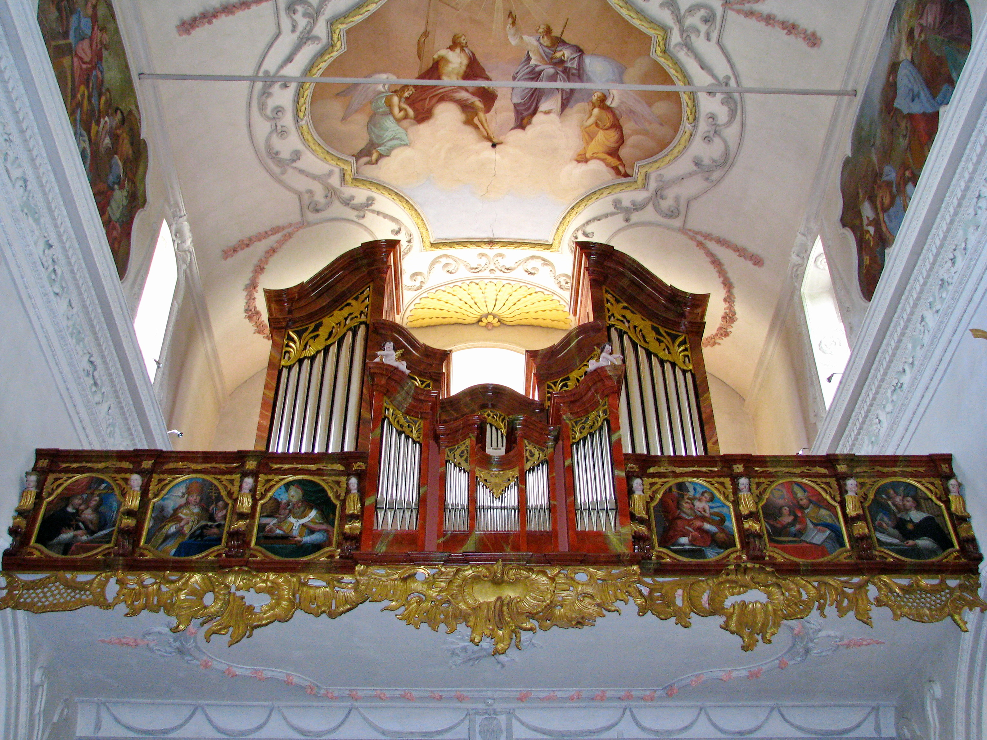 Kloster Wettingen in Wettingen